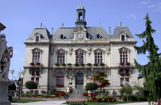 Description : Tarbes (65) - Hôtel de Ville Date : août 2004 Author : Ifernyen Source : Archives personnelles Statut : GFDL Ifernyen